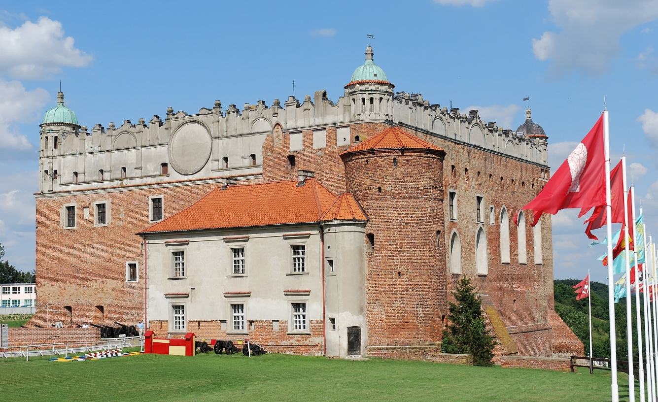 Golub Dobrzyń - zamek